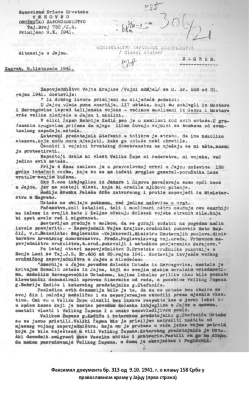 Документ о клању 158 Срба у православном храму у Јајцу